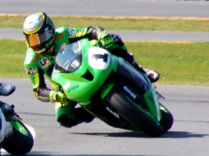 Roger Lee Hayden at 2008 Daytona 200 (Supersport)